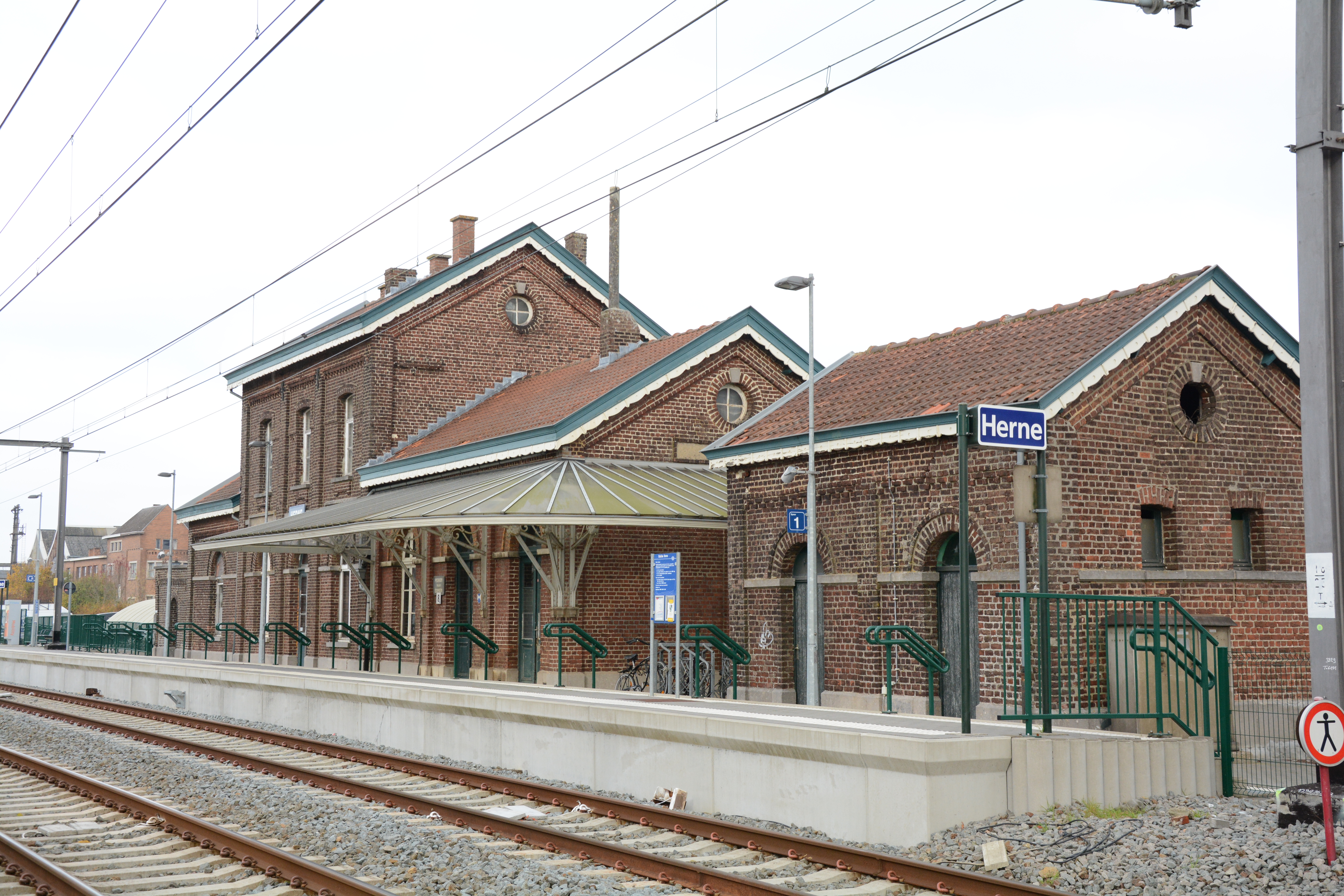 Station van Herne